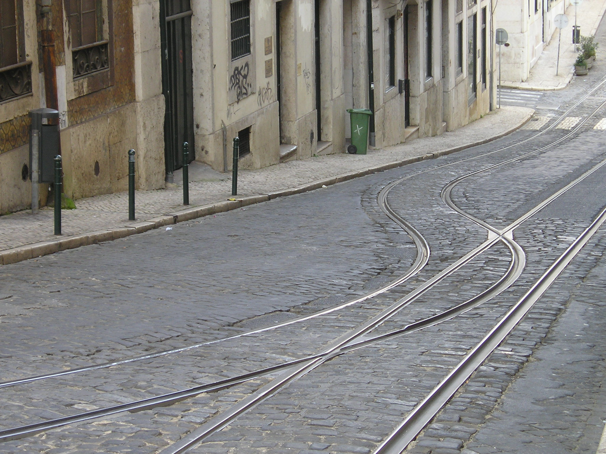 A linha desvia-se, para evitar a PIDE na António Maria Cardoso.